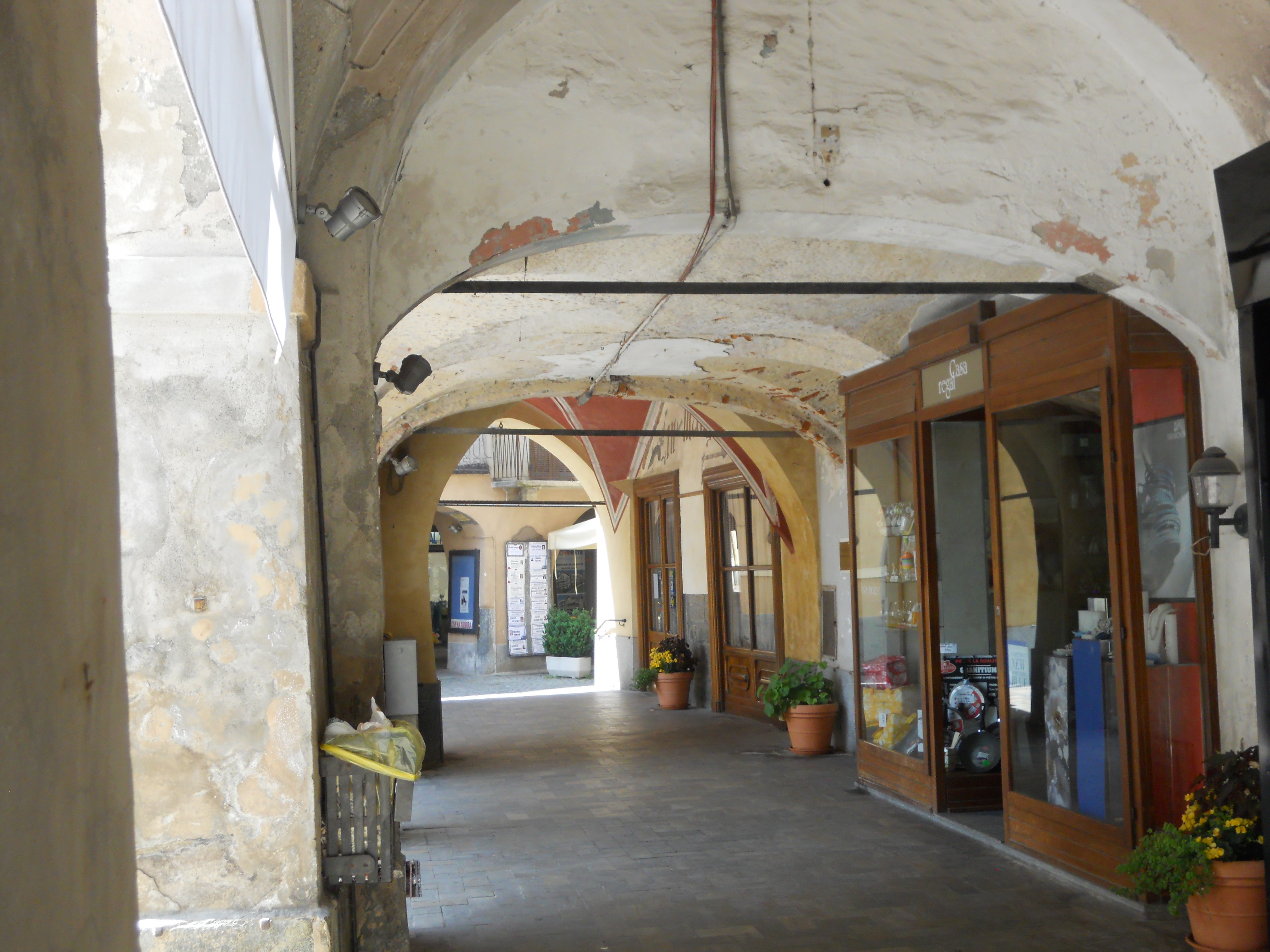 Tipo di portici in Piemonte